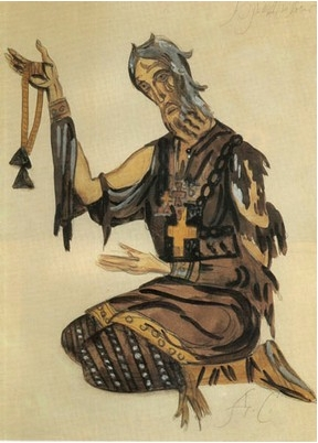 Дмитрий Стеллецкий. Эскиз костюма юродивого к опере "Борис Годунов". 1908